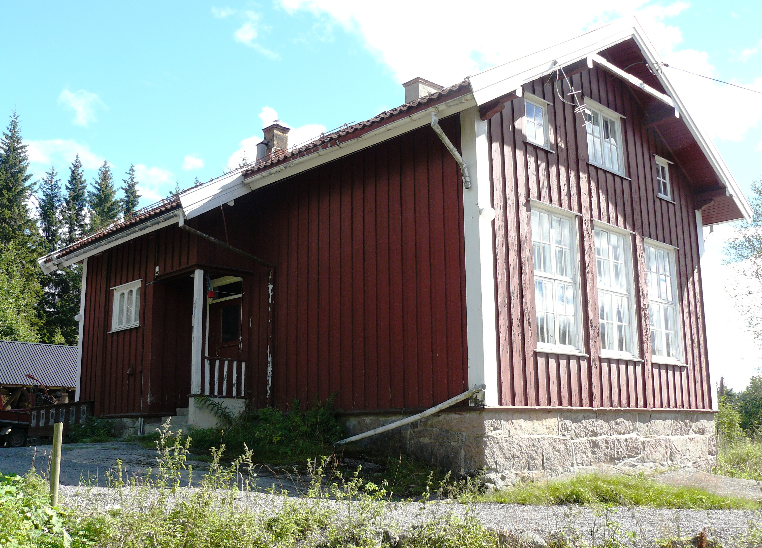 Nordmarka school, Oslo